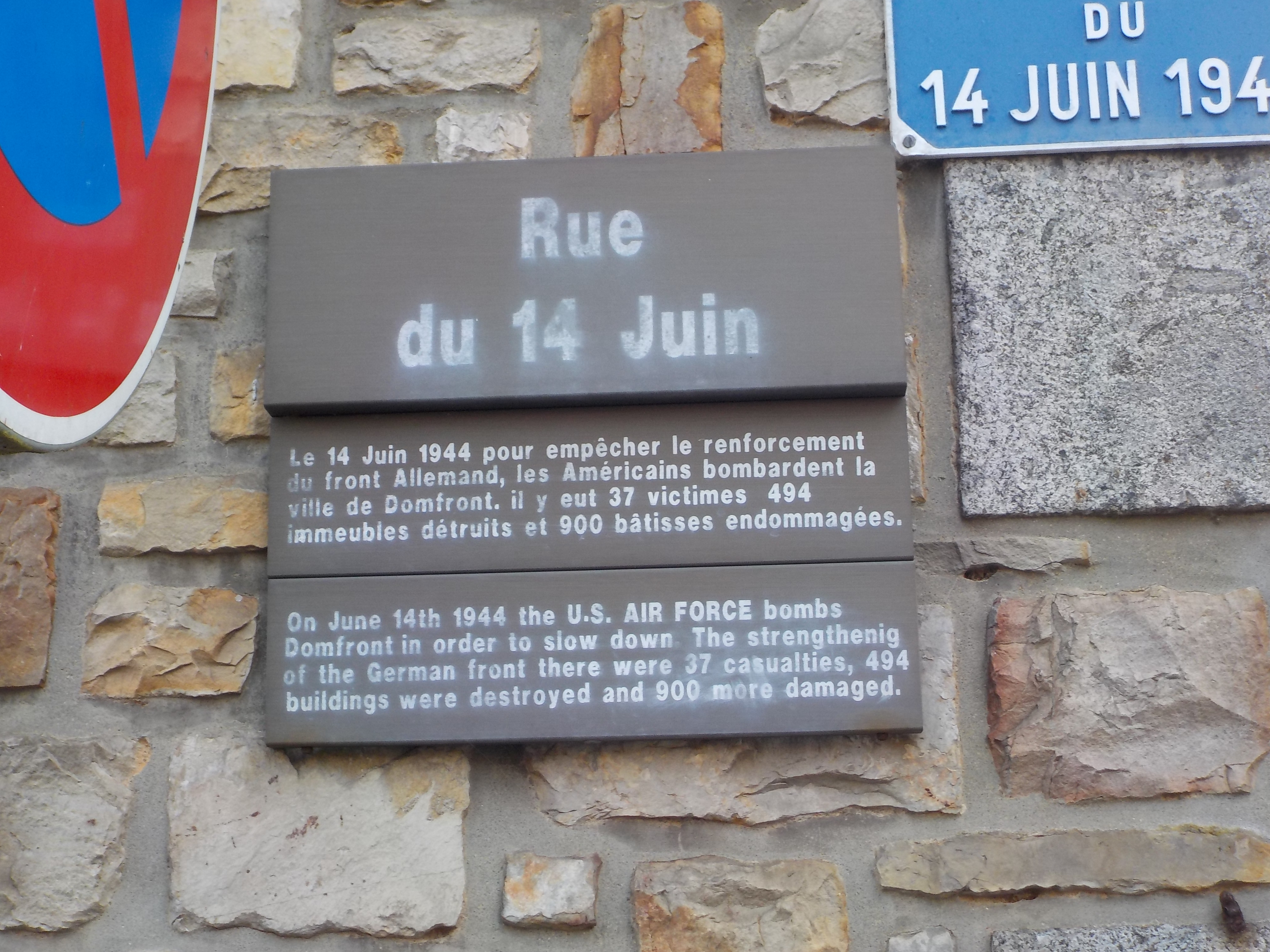 Domfront plaque de rue du 14 juin 1944 bombardement